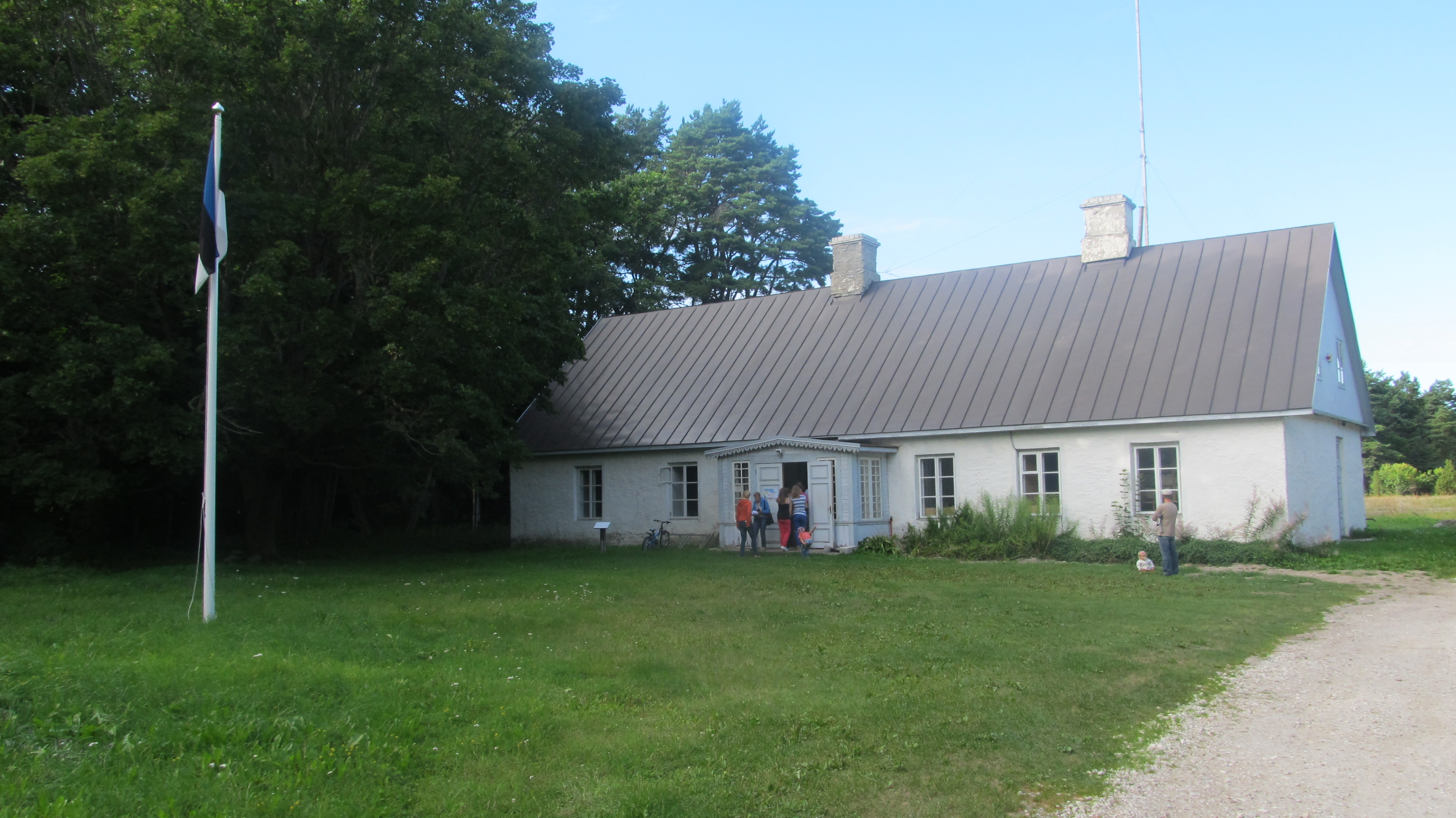 Kassari kool-rahvamaja, tuntud ka Kassari Seltsimajana